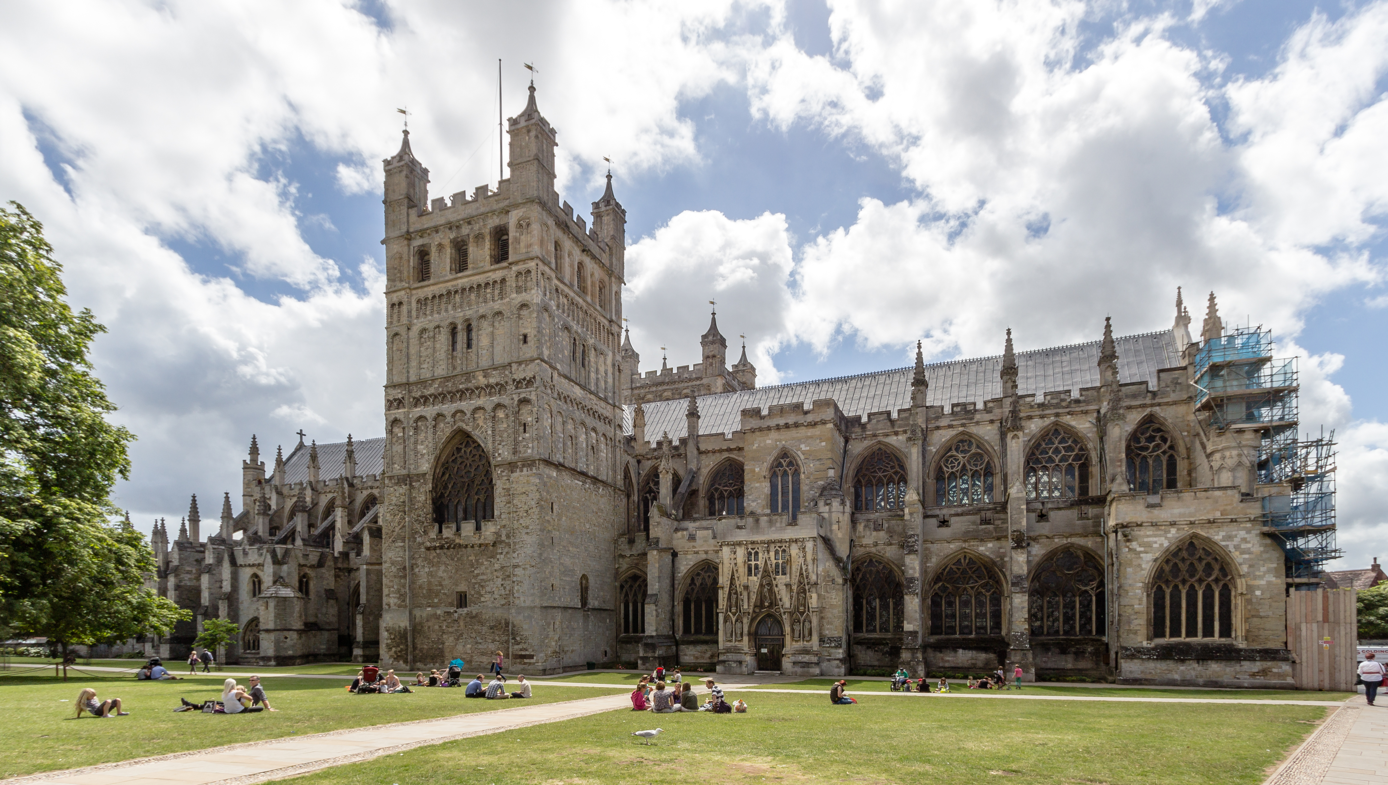 St.-Peter-Kathedrale in Exeter, Devon, UK